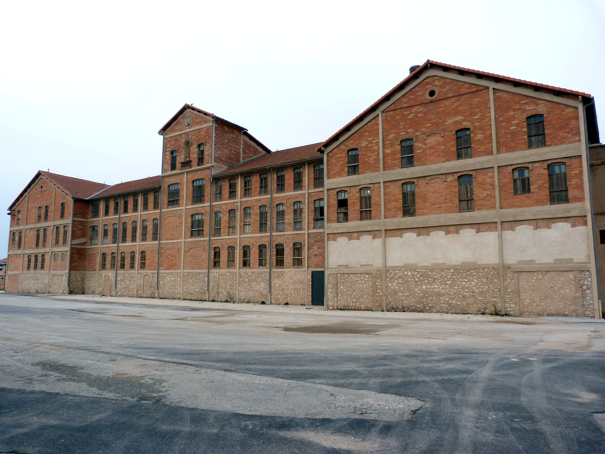 Camp des Milles, Marseille